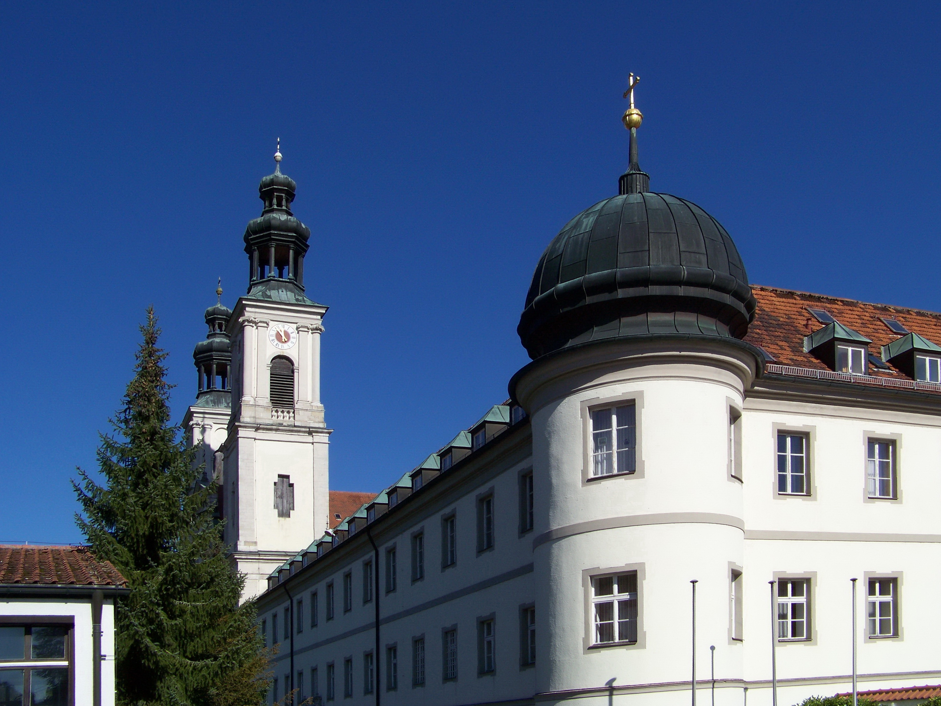 Pielenhofen. Konvent, dreigeschossige Mehrflügelanlage mit Walmdächern, Eckturm mit Haubendach und Säulenportal mit Schweifgiebel und Wappen, 1702-39 auf mittelalterlicher Grundlage.